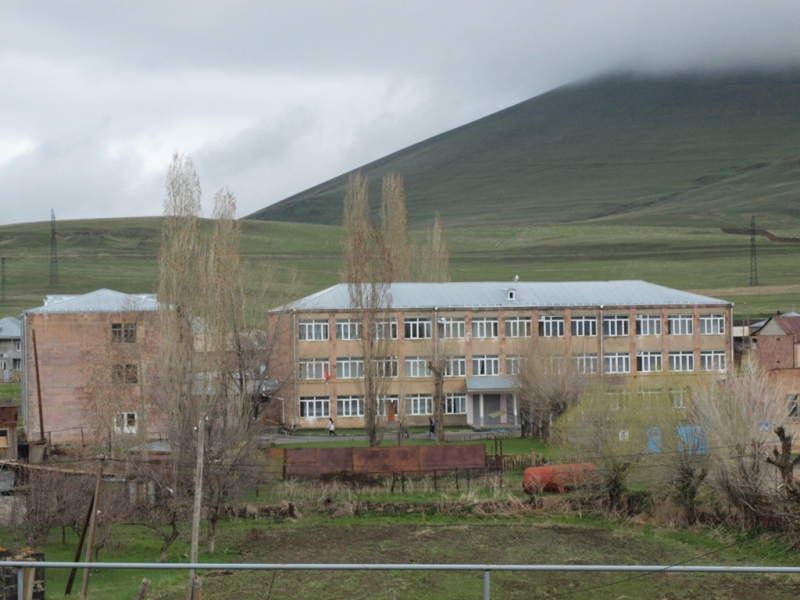 Վարսեր